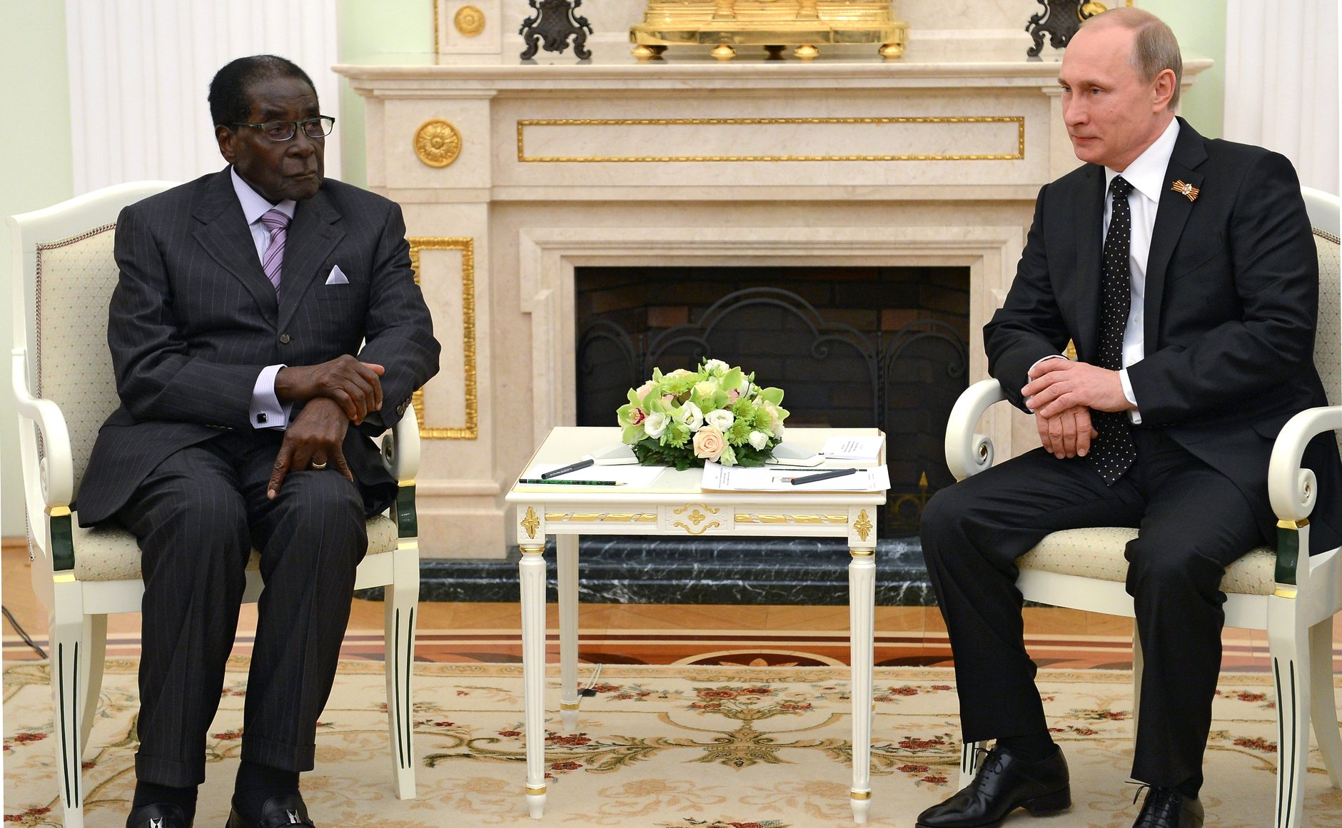 Президент России владимир Путин с Президентом Зимбабве, председателем Африканского союза Робертом Мугабе